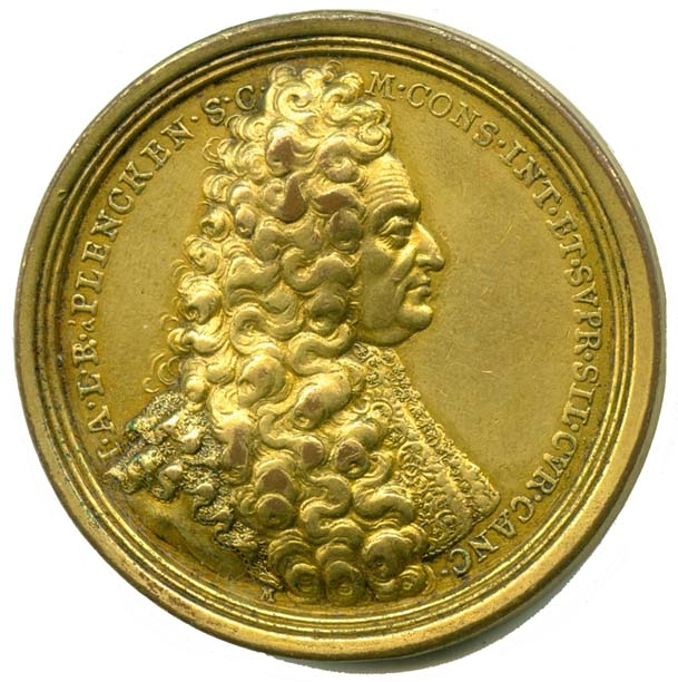 Gedenkmedaille für Johannes Adrianus von Plencken von 1718; Foto: 2009.